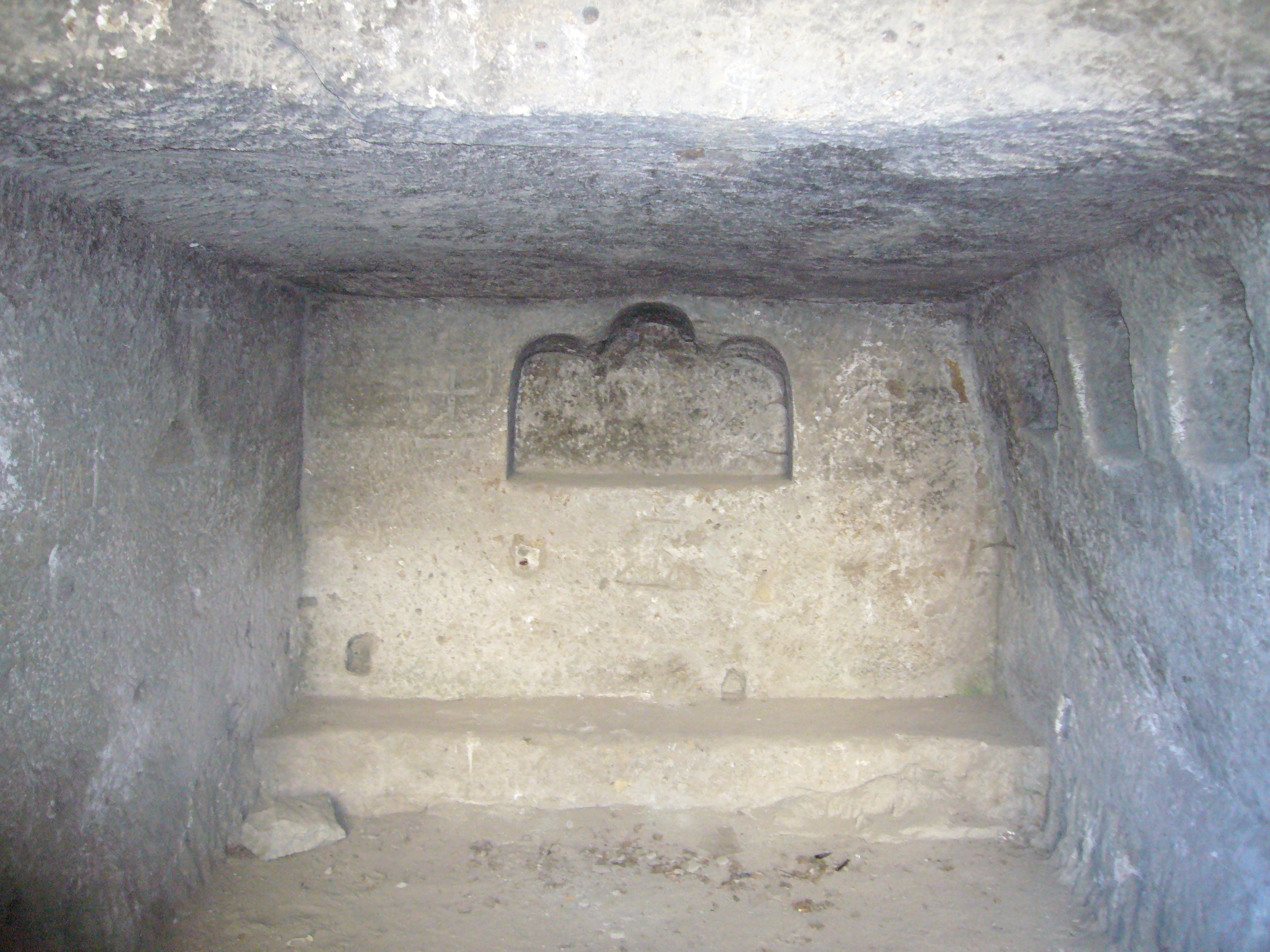 Napoli, Castel Sant'Elmo: la grotta dell'eremita